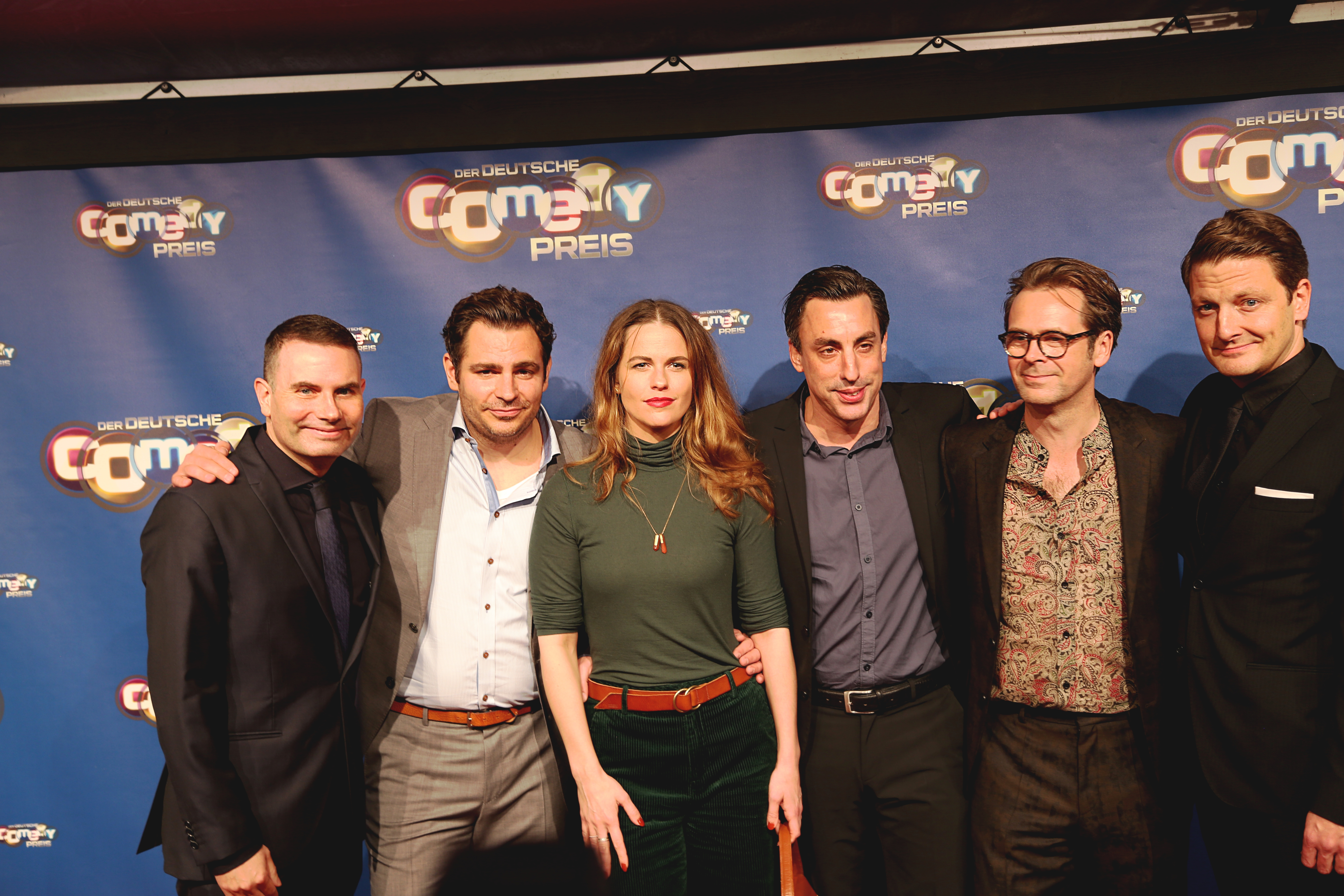 Cast von "Sketch history" beim Deutschen Comedypreis 2017.